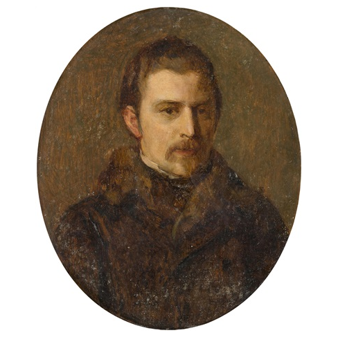 Portrait des Violinisten Otto von Königslöw